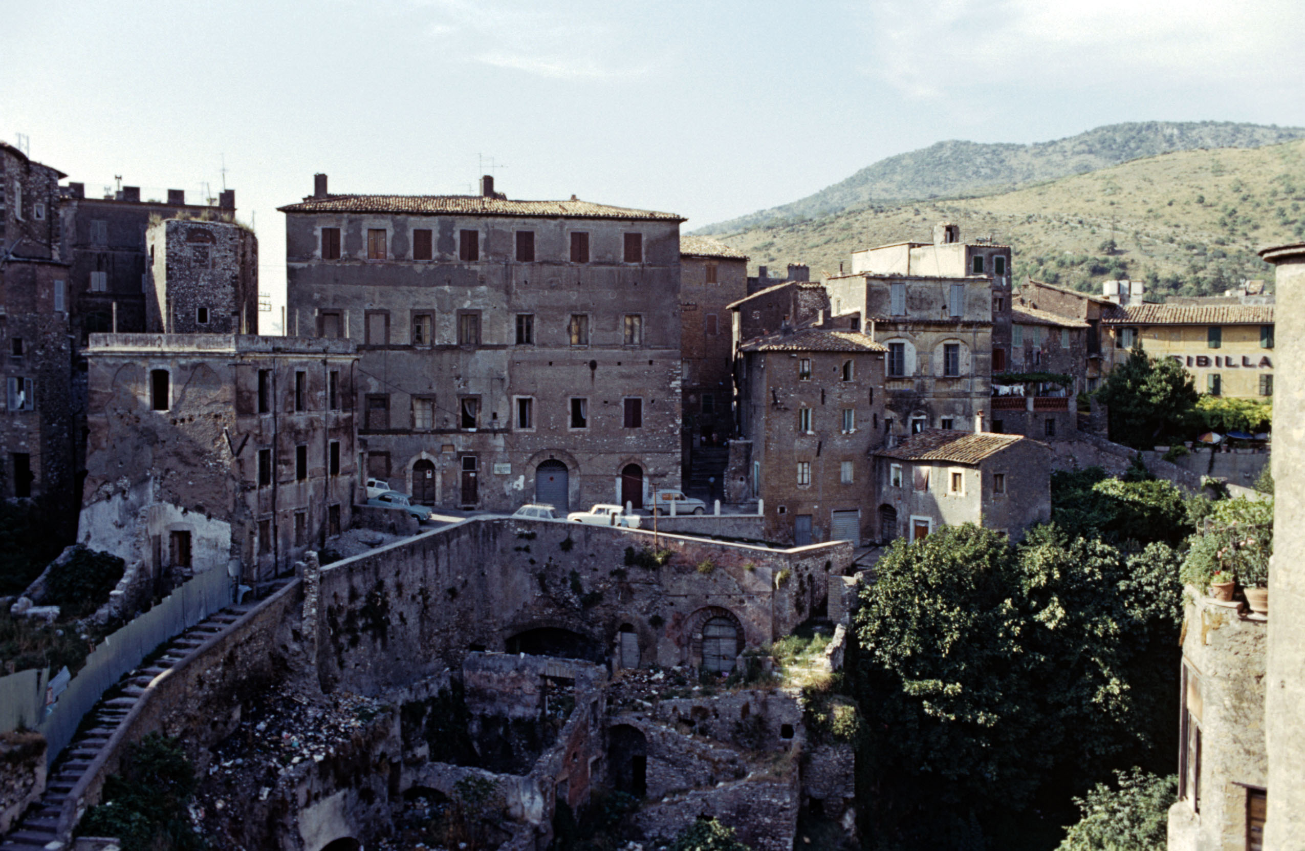 Tivoli